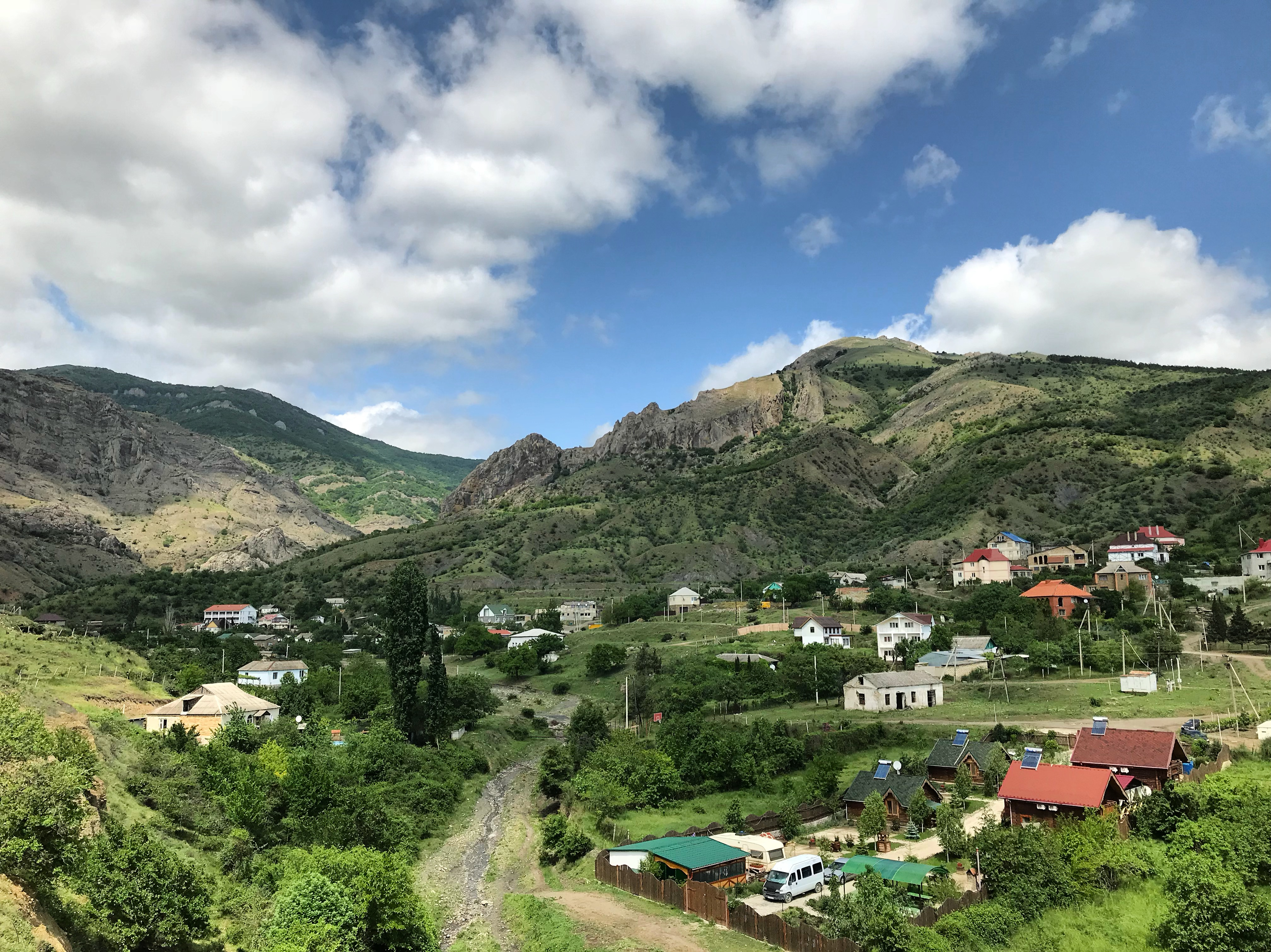 Фото села Зеленогорье в Крыму